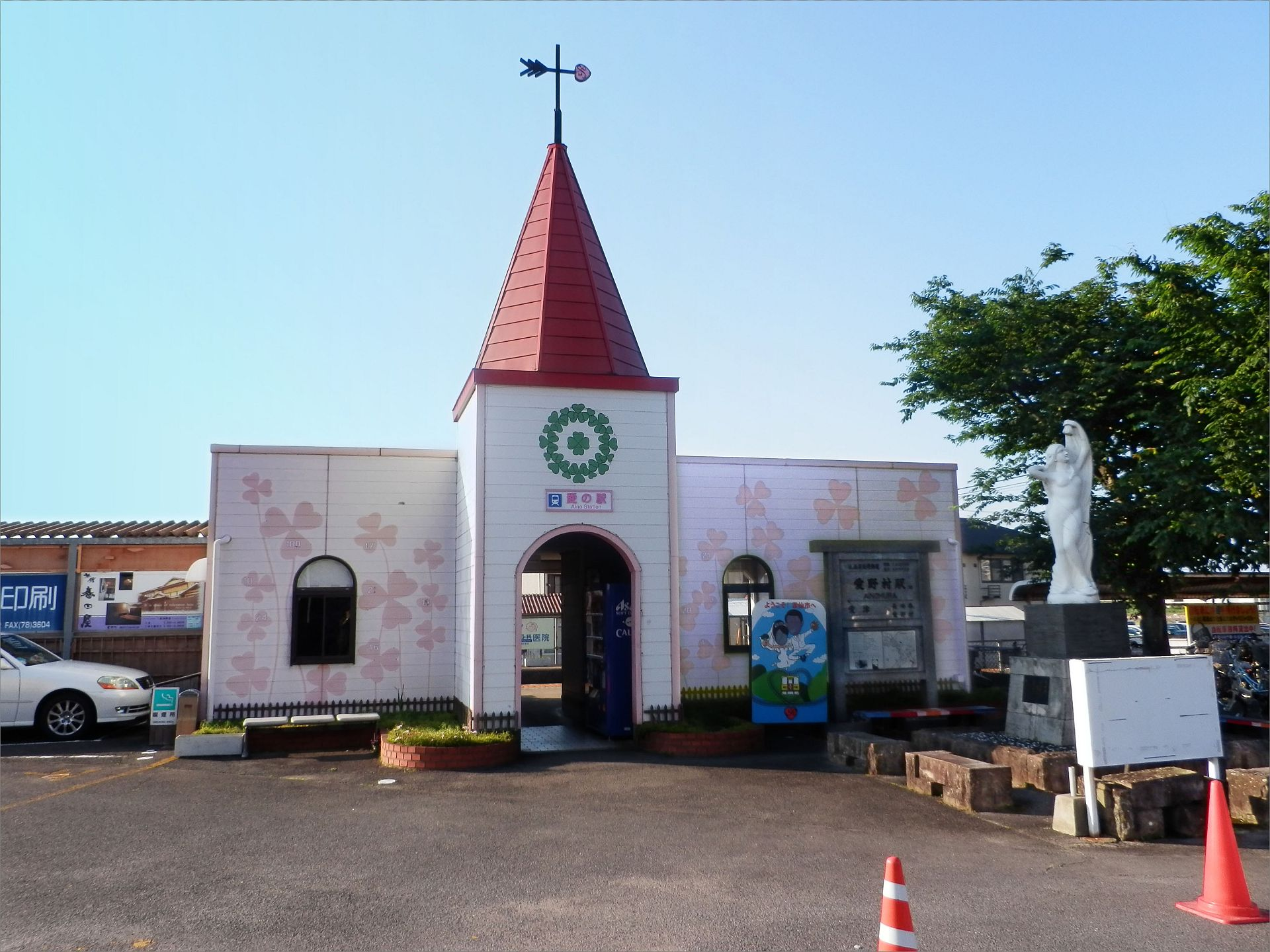 島原鉄道・愛野駅の駅舎。